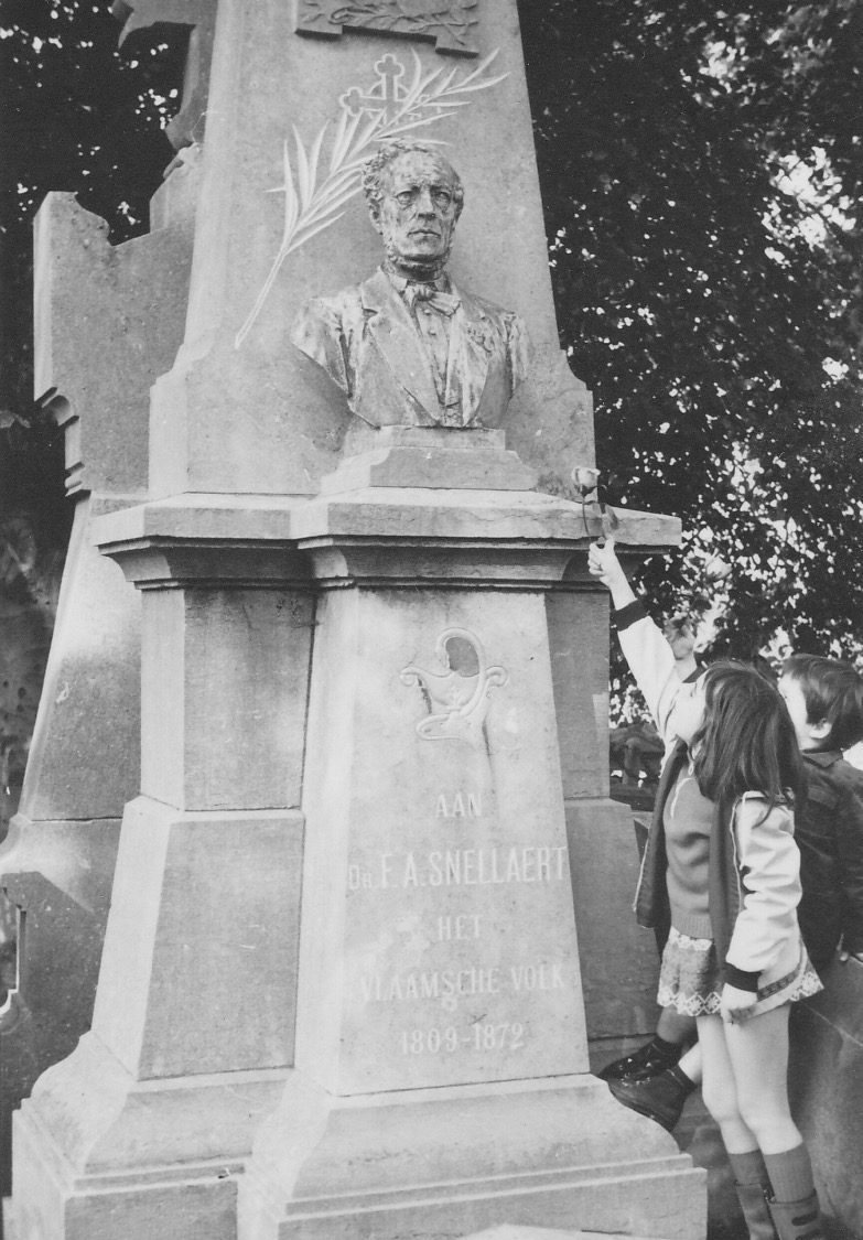 Betreft een foto van het grafmonument van Ferdinand Snellaert 1809-1872 op het Campo Santo te Sint-Amandsberg. De foto maakt deel uit van ons familiealbum en ikzelf heb de zwart-wit foto genomen in de reeks van onze familieleden die in de omtrek begraven werden in de familiegrafkelder. Op het moment van de opname in mei 1971 was een schoolklas ook aanwezig op de Sint-Amandusheuvel. De kinderen zijn mij echter onbekend. Ik ondergetekende Herman De Rave verklaar akkoord te gaan met de voorwaarden van Wikipedia. Ik verzoek de foto in overweging te willen nemen om hem te plaatsen bij het lemma van Ferdinand Snellaert.